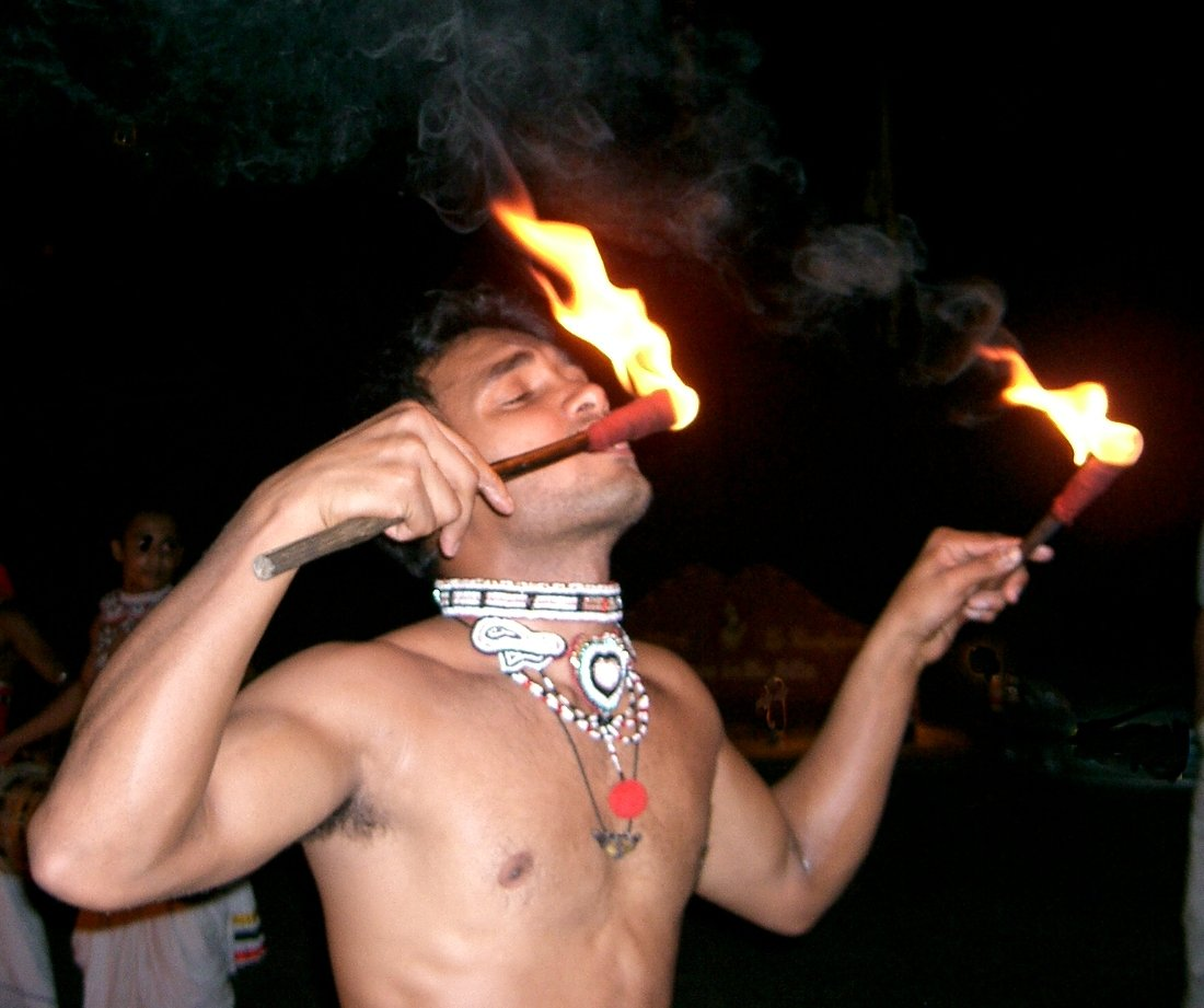 cracheur de feu au Sri Lanka self made PRA